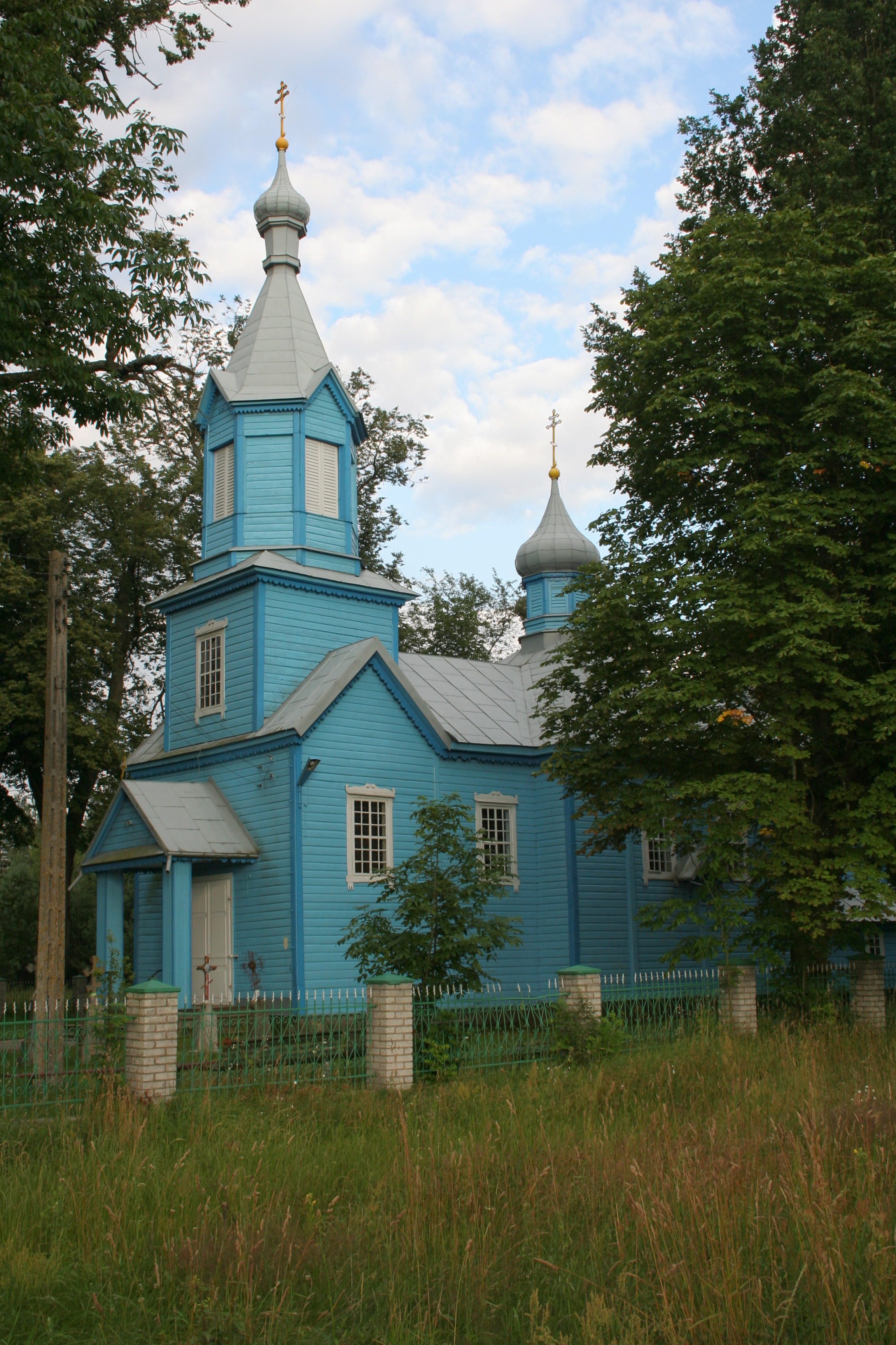 Cerkiew Podwyższenia Krzyża Pańskiego w Werstoku.